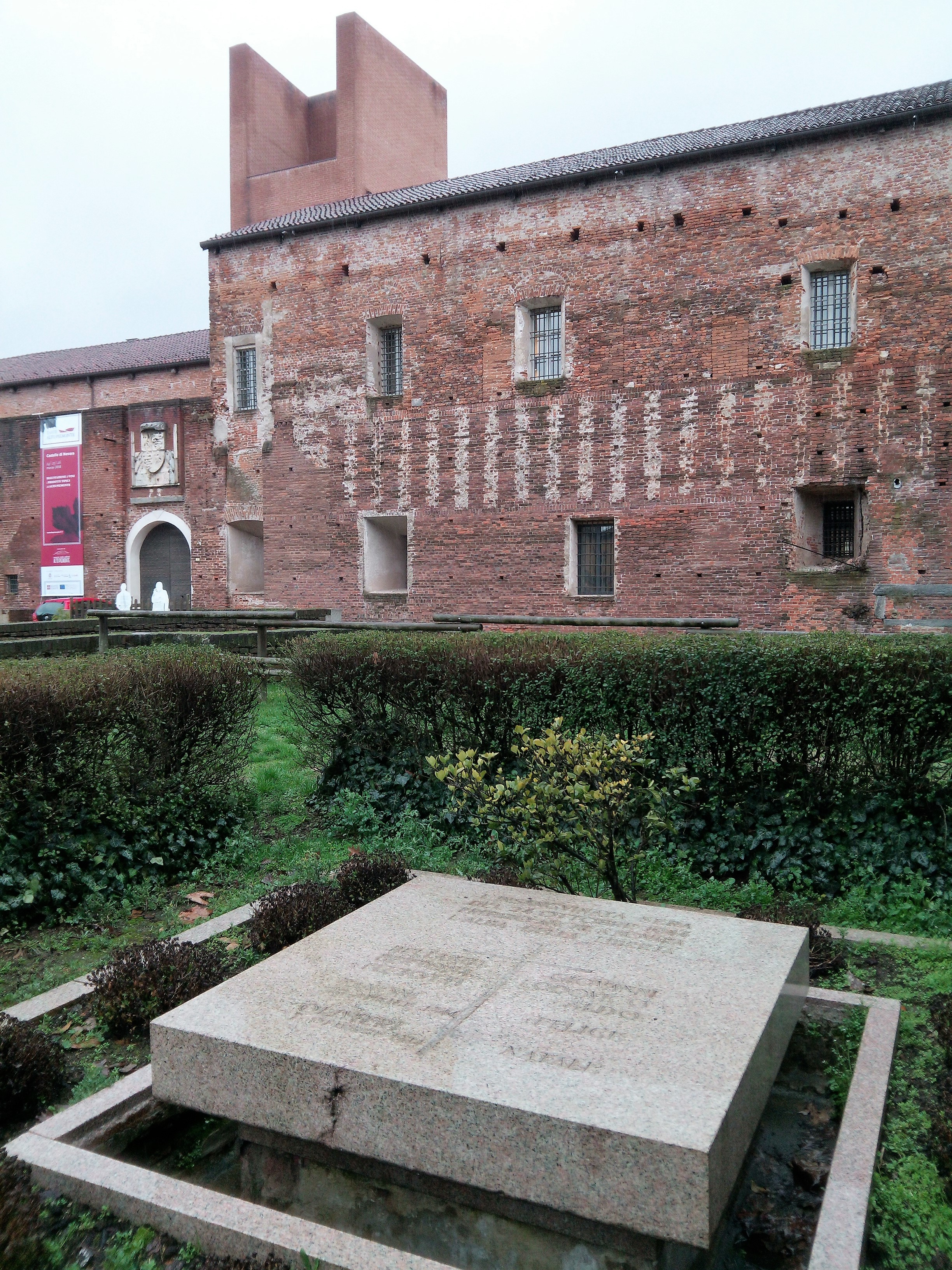 lapide con i nomi dei partigiani uccisi in piazza Martiri a Novara, con il castello sullo sfondo